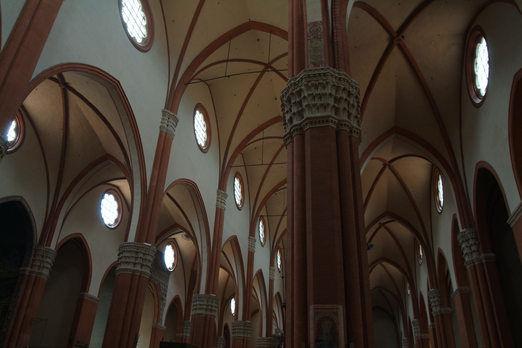 San Petronio